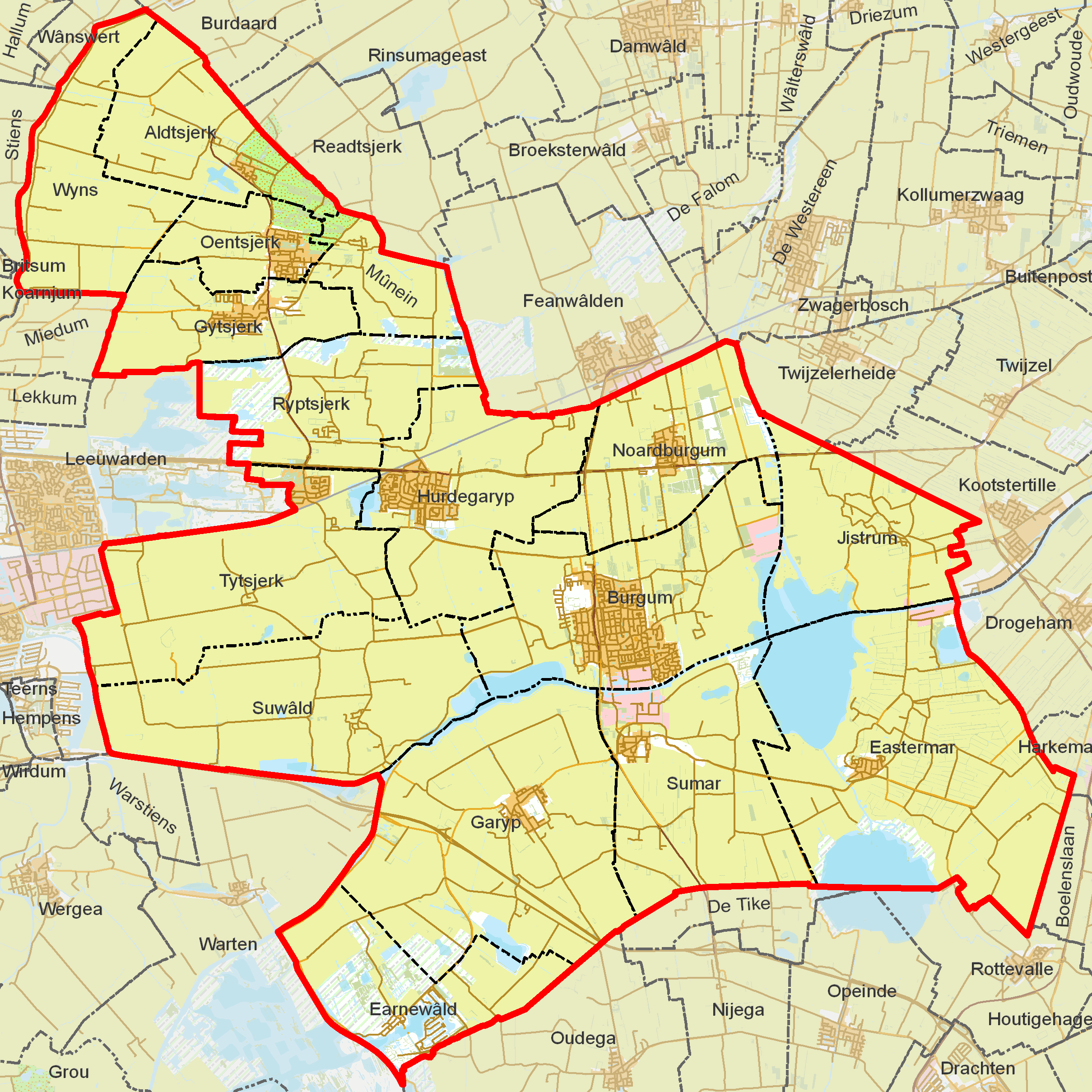 BAG woonplaatsen - Gemeente Tytsjerksteradiel.png